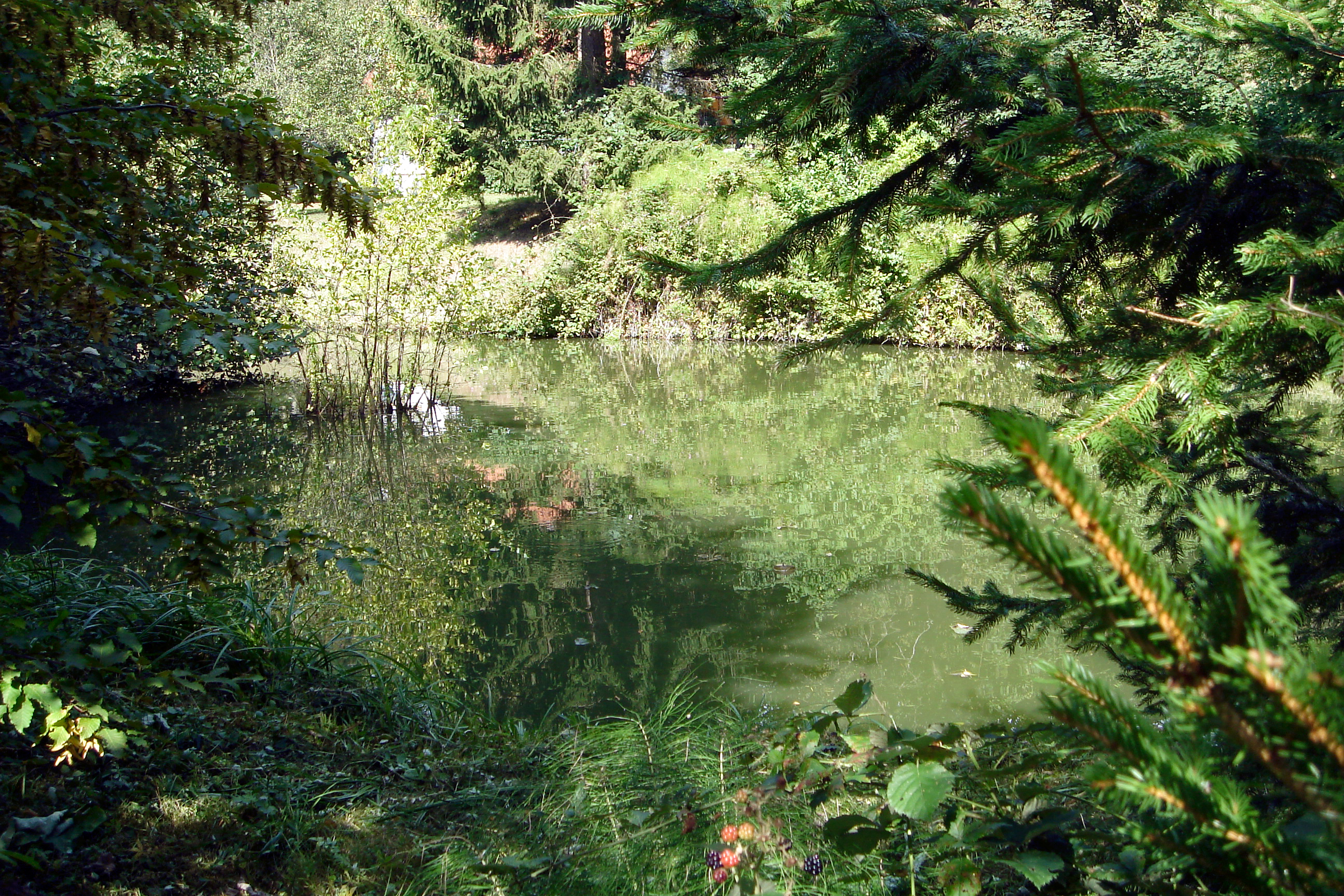 Ritzing, Kolonie Helenenschacht, ehemalige Lehmgrube